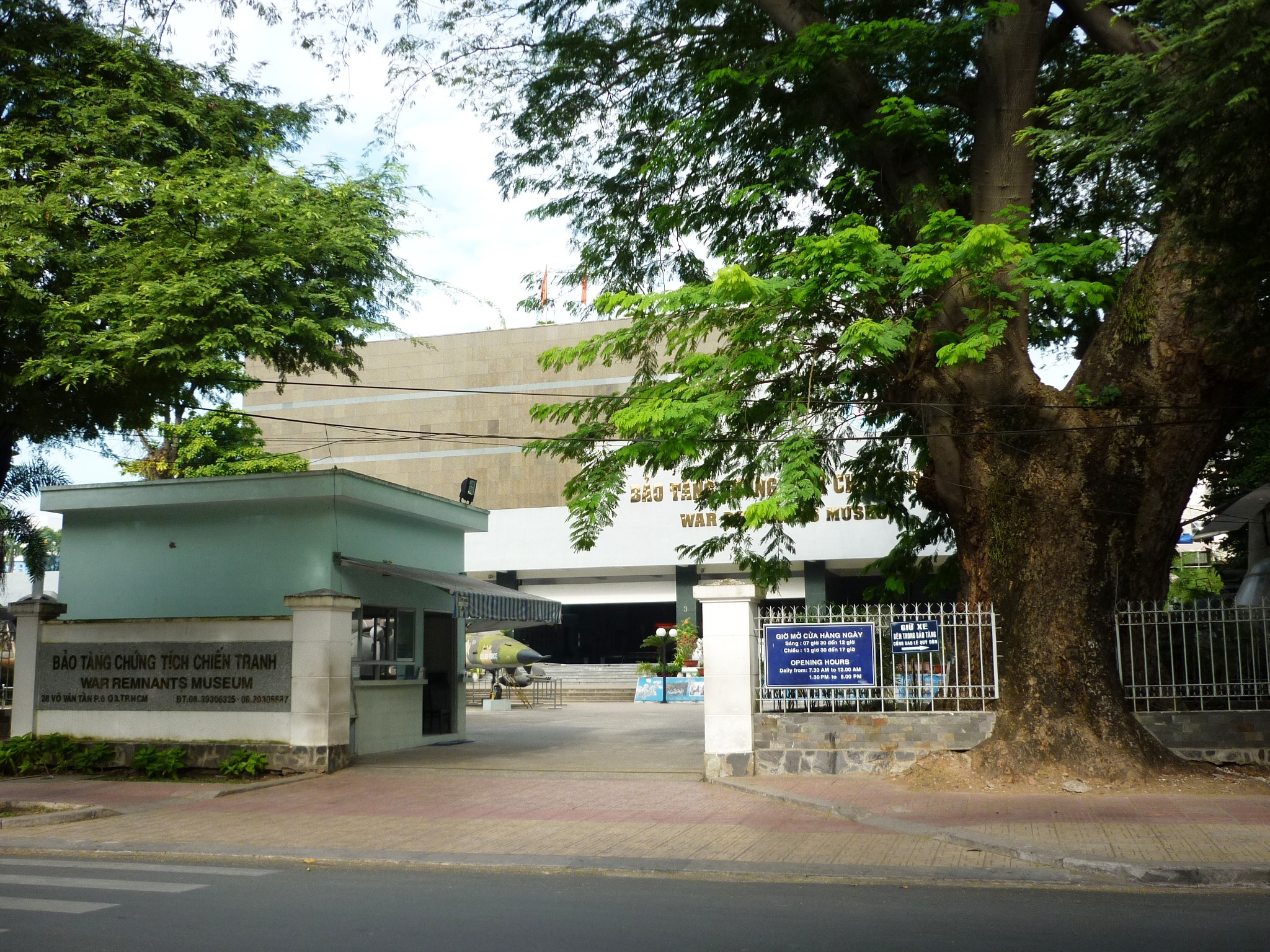 Lối vào bảo tàng Chứng tích chiến tranh trên đường Võ văn Tần, quận 3, thành phố Hồ Chí Minh